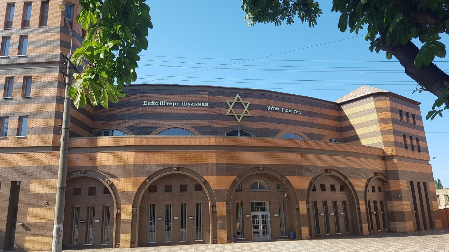 בית הכנסת החדש בעיר קריבוי רוג